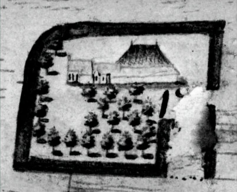 De boerderij 't Hooihuis op een kaart van Henricus Teijsinga uit 1736